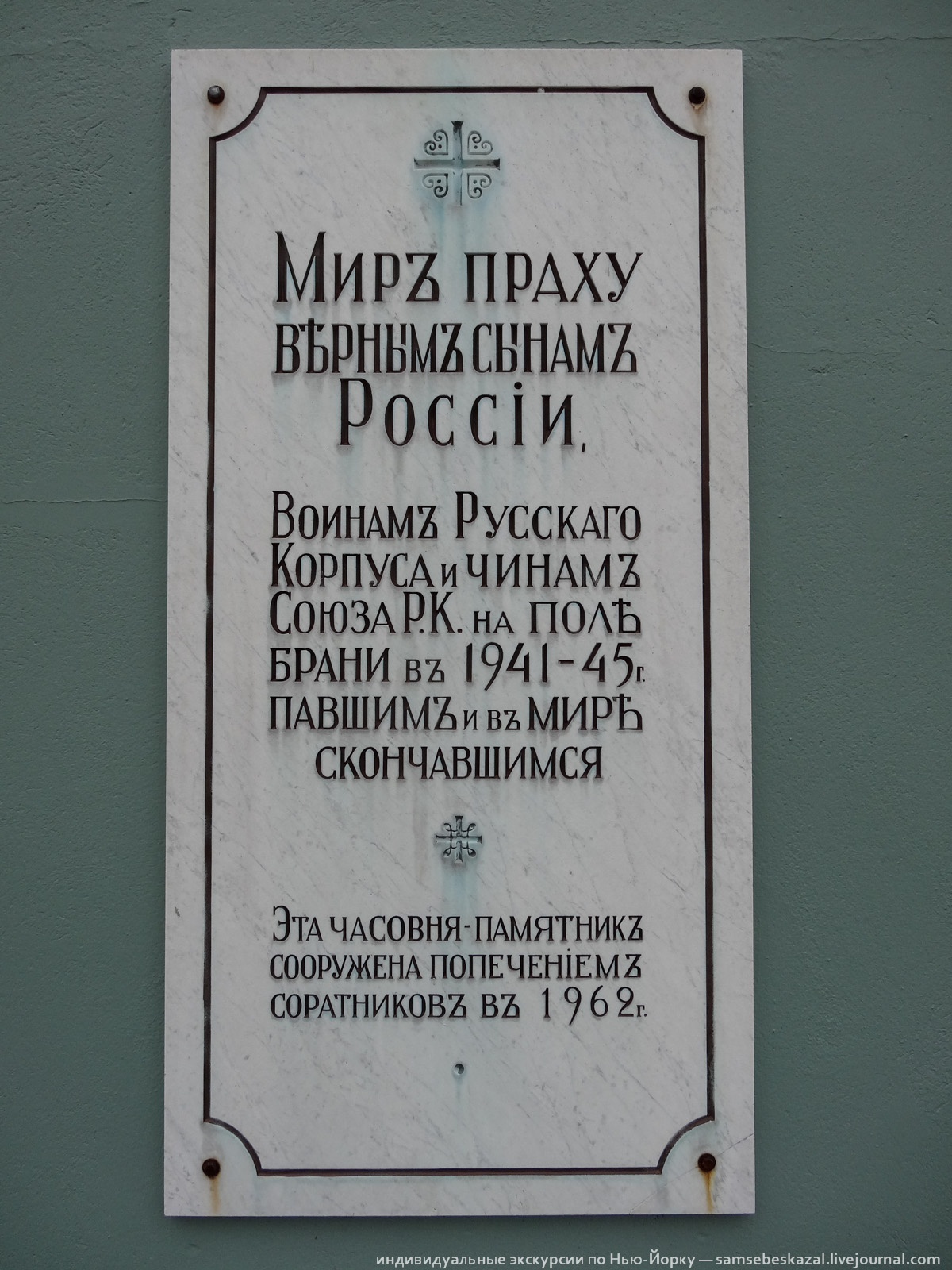 08889.jpg